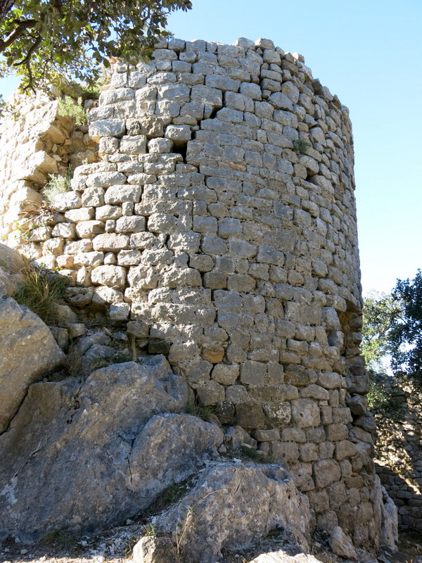 Castellot de Beuda - Beuda / Garrotxa- Catalunya